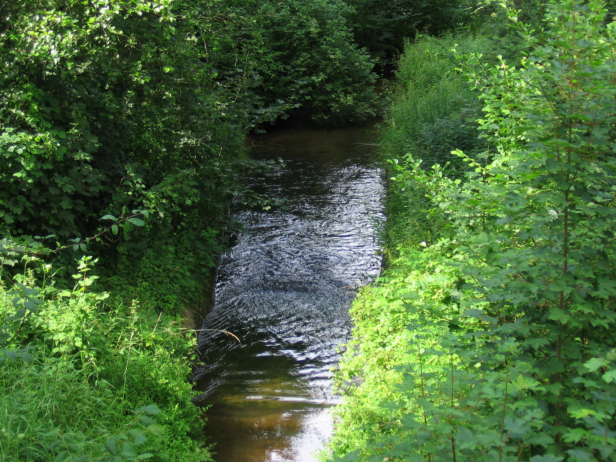 Rzeka Rega po północnej stronie mostu drogi z Bierzwnicy do Kluczkowa